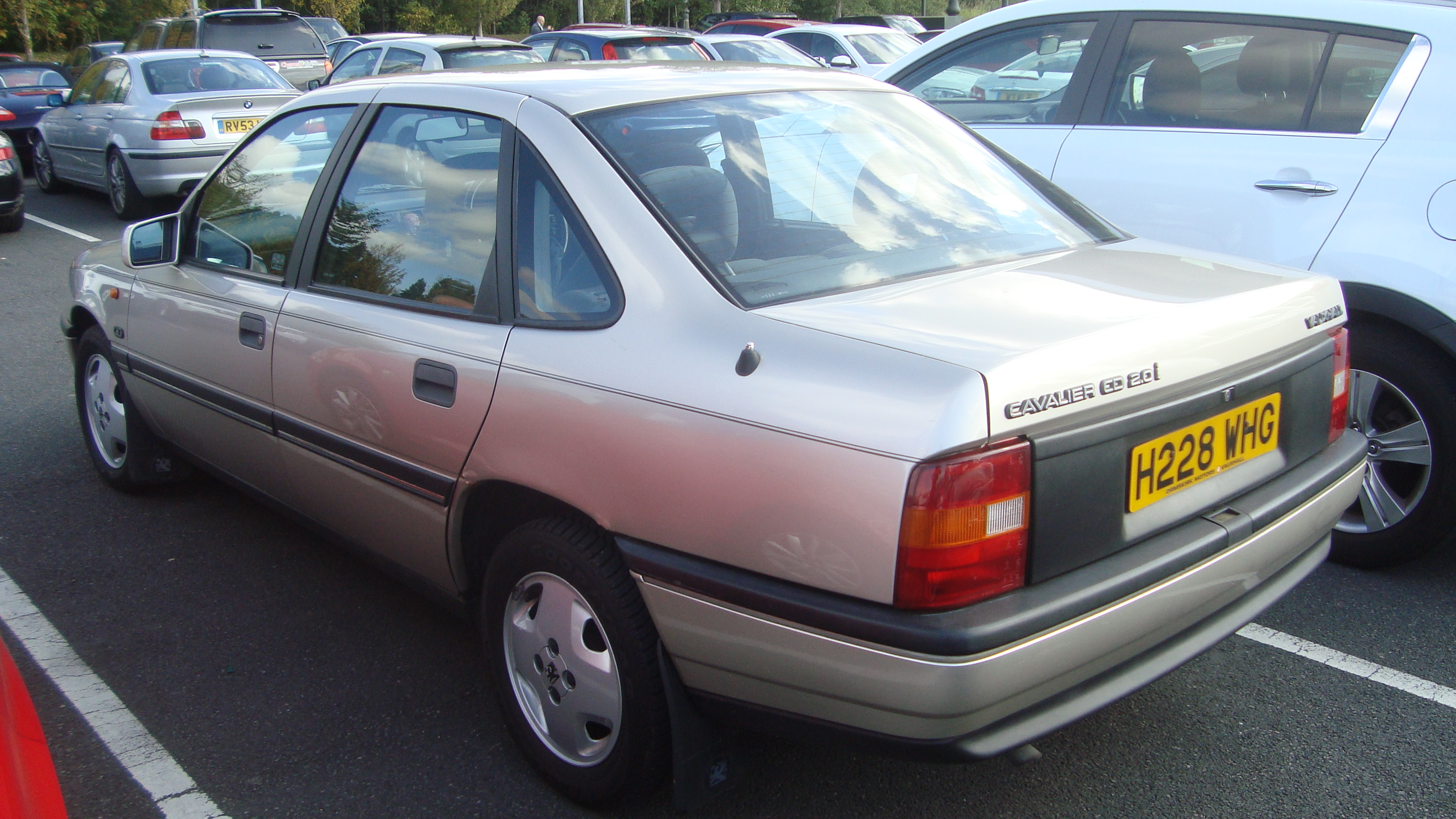 1990 Vauxhall Cavalier 2.0 CDi Automatic